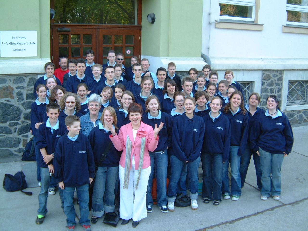 Foto gemaakt te Leipzig. Op de voorgrond een van de begeleidsters, mevr.Meloni, links daarachter mevr. Schwanen, en achteraan links in het rood meneer Schwanen. Dhr. Steffann maakte deze foto, zodoende staat hij er zelf niet op.